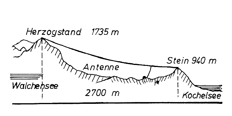 Skizze der Bergantenne am Herzogstand, Deutschland